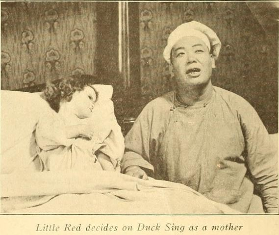 Little Red Decides, film de Jack Conway (1918), avec Barbara Connelly et Goro Kino